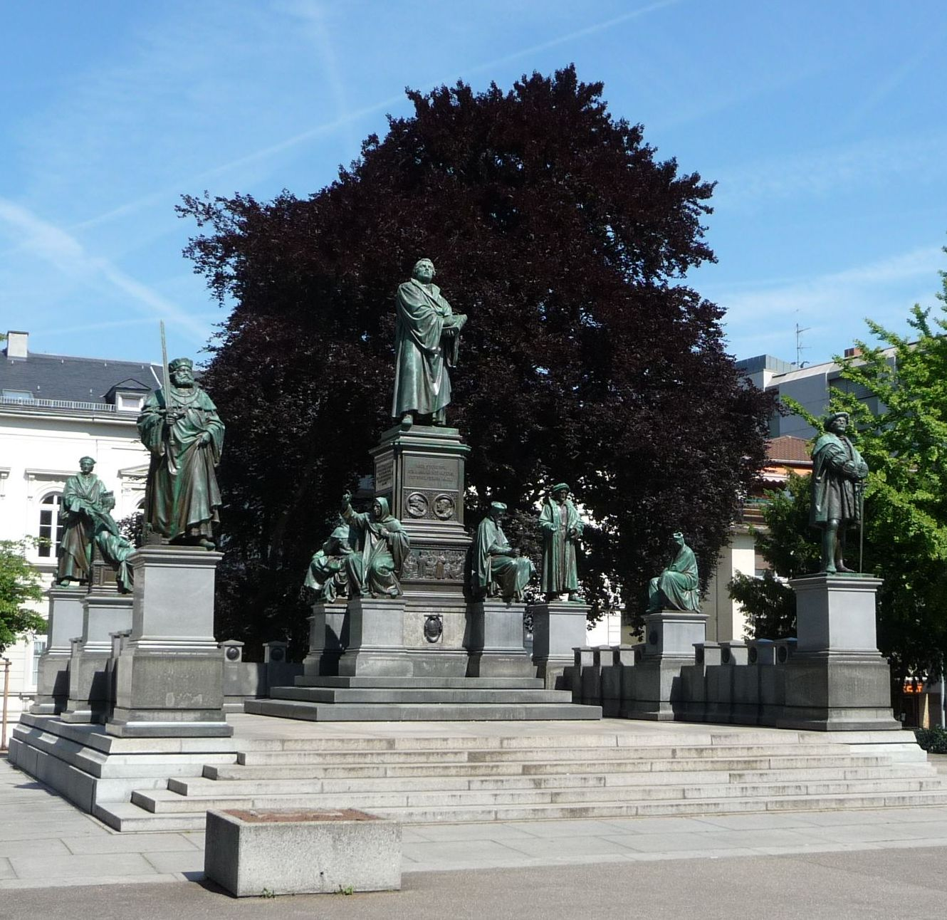 Lutherdenkmal